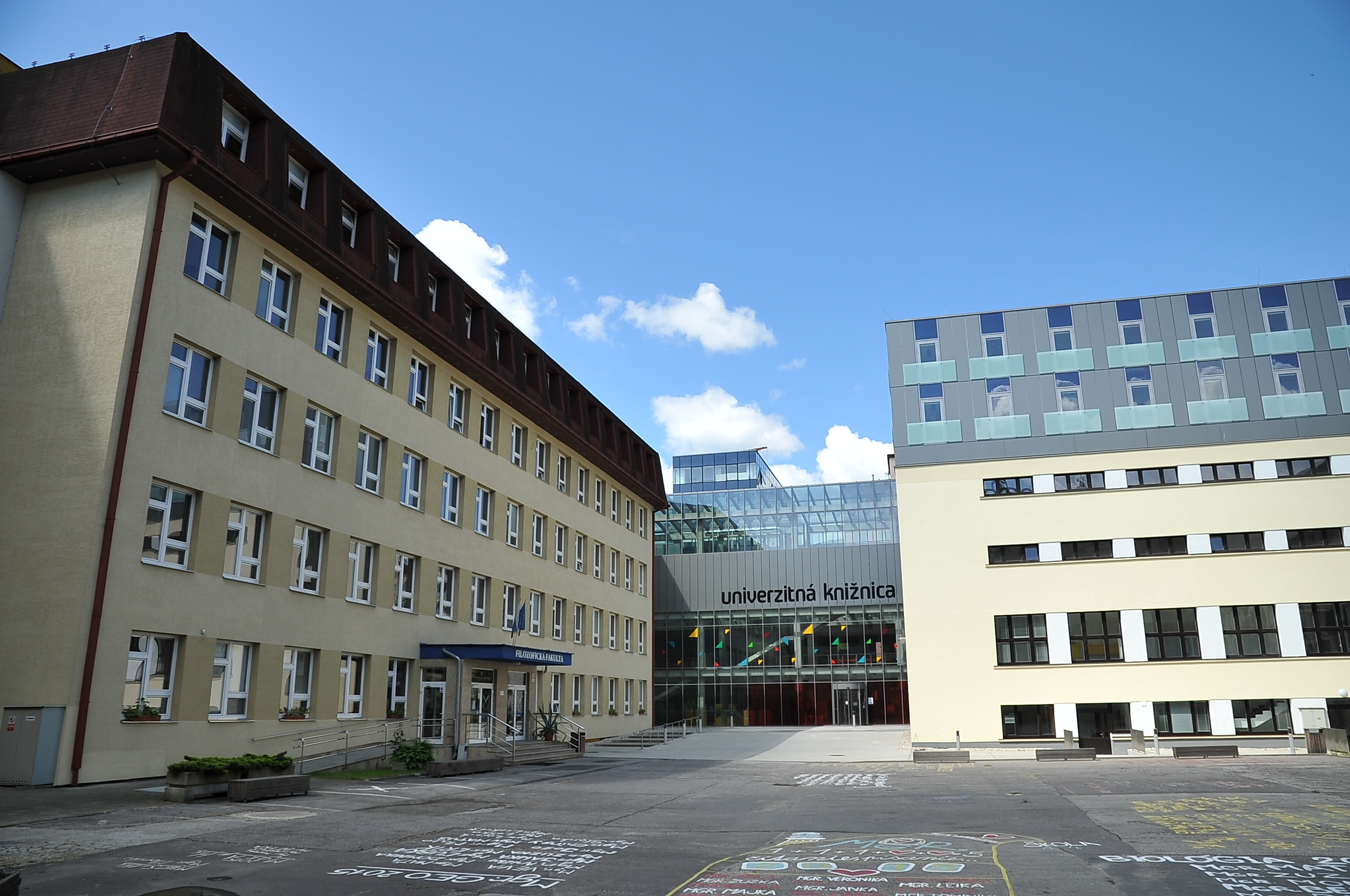 Filozofická fakulta Katolíckej univerzity v Ružomberku (budova vľavo). Pohľad na átrium smerom na FF KU a Univerzitnú knižnicu KU.